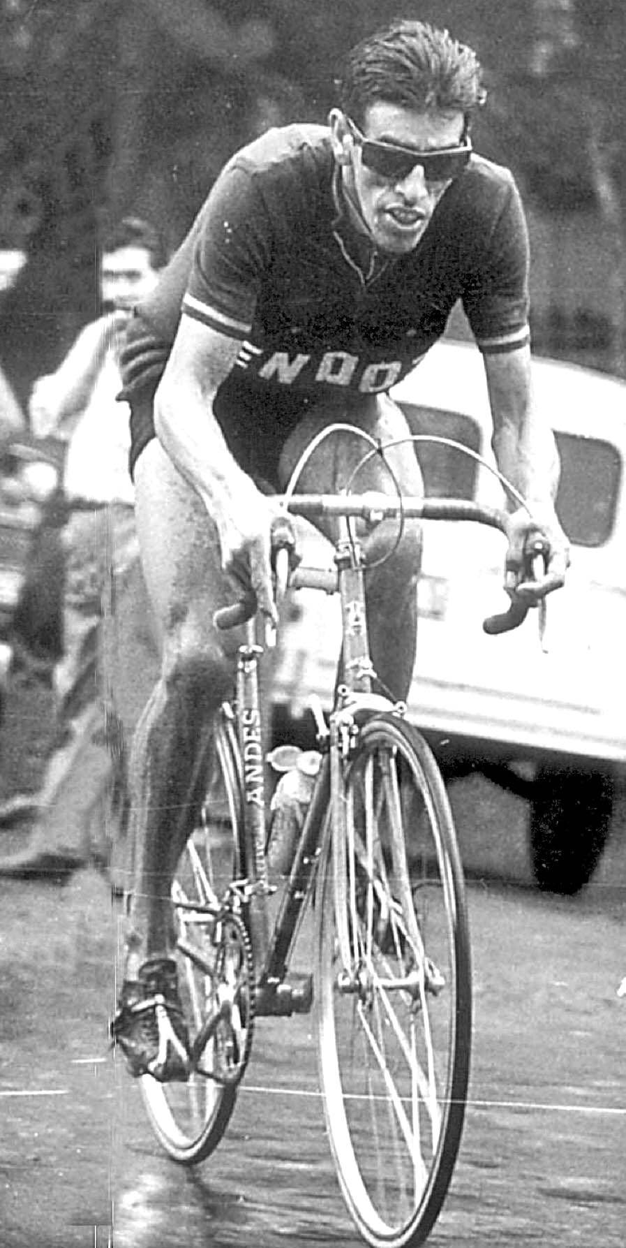 ciclista